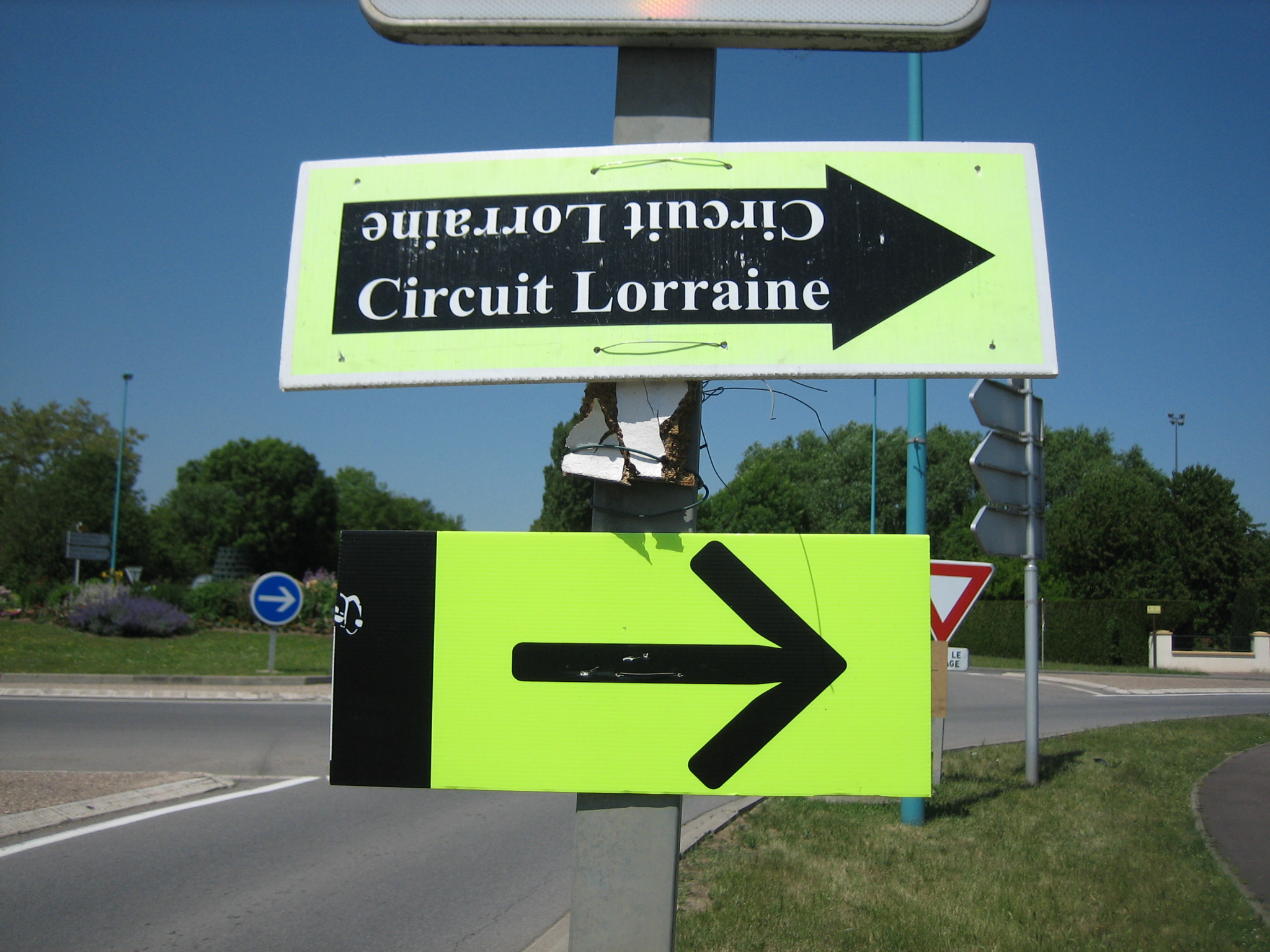 Wegweiser beim Circuit de Lorraine 2011 in Boulay-Moselle